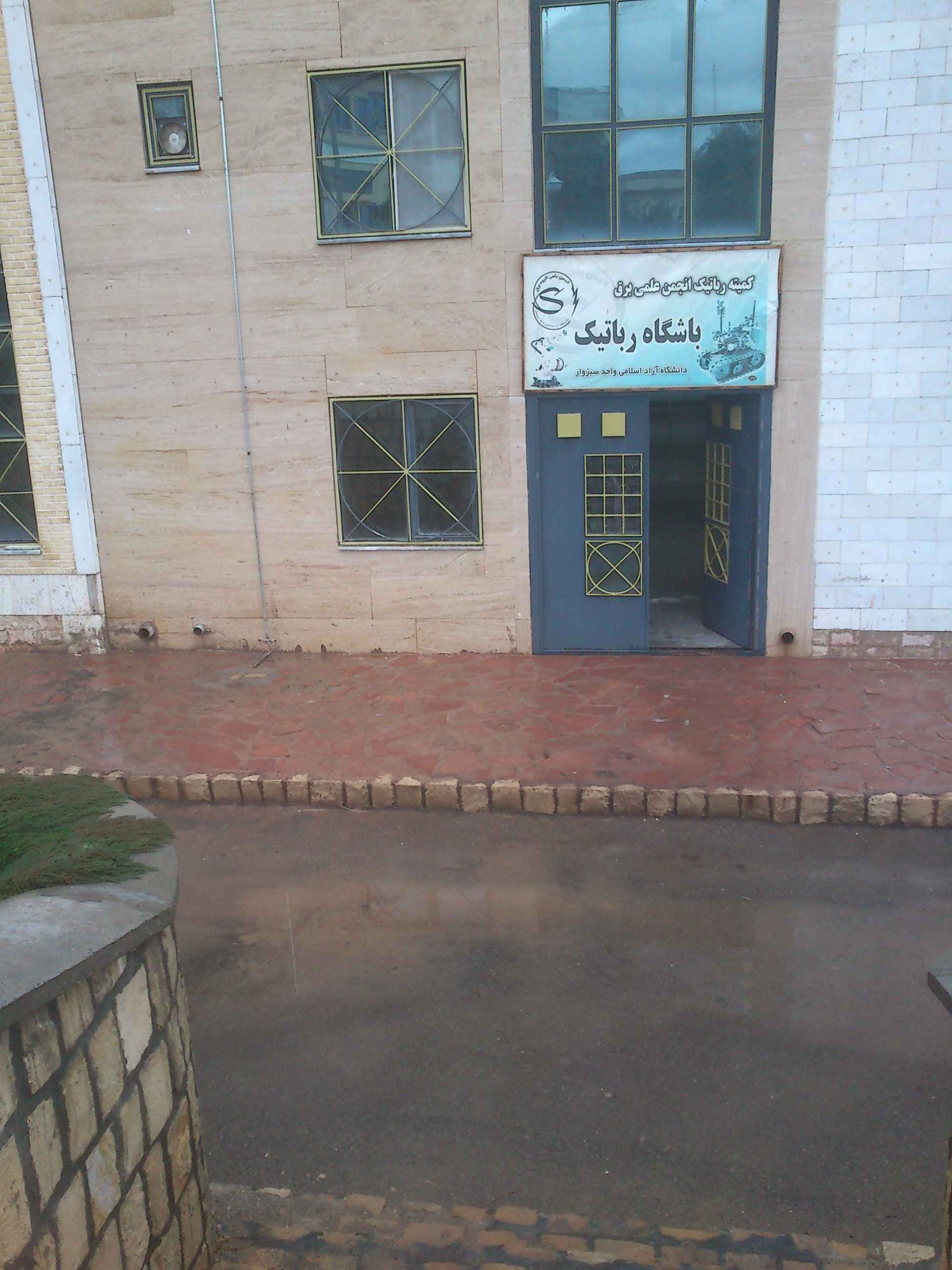 باشگاه رباتیک